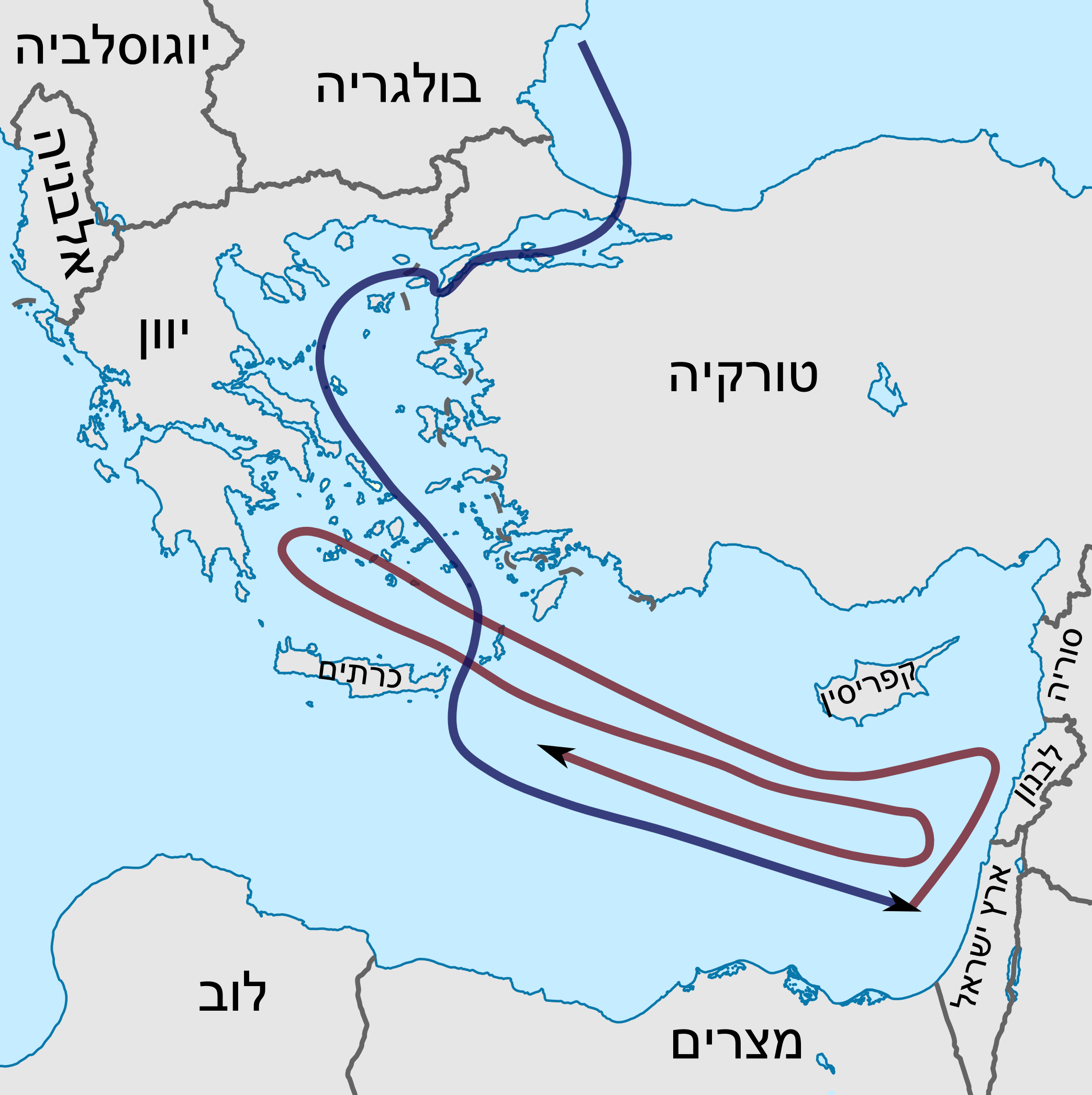 מפת דרכה של ולוס ב